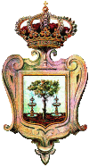 ESCUDO DE HIGUERA LA REAL (Badajoz, España)